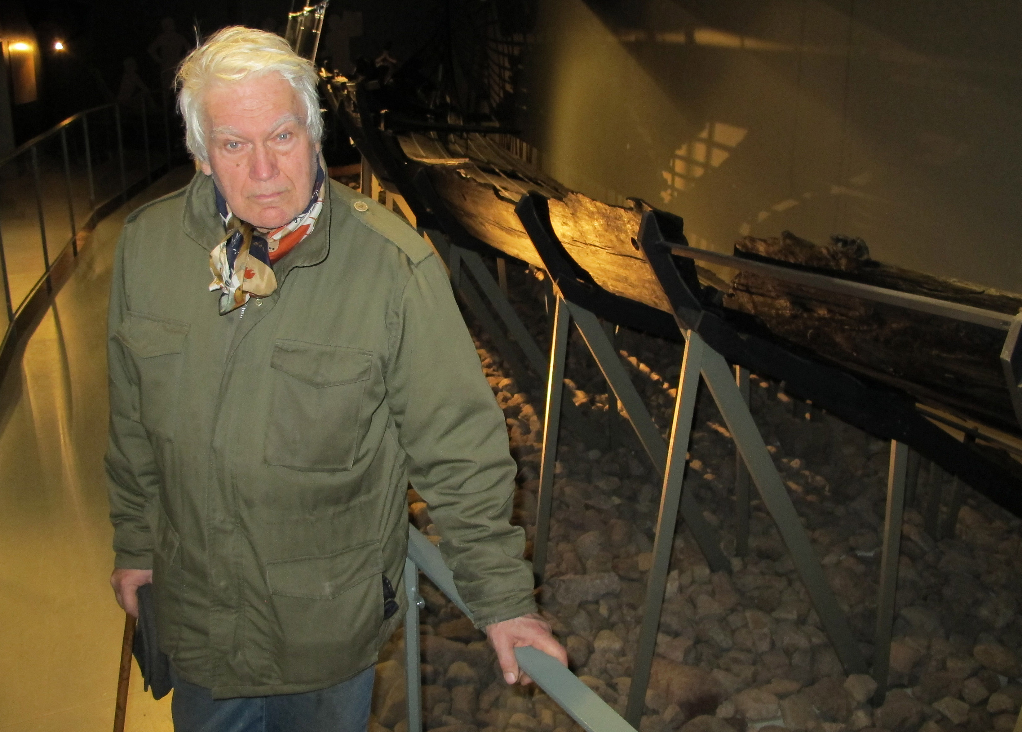 Ved Klåstadskipet i Slottsfjellmuseet. Christen hadde ansvaret for utgravningen av Klåstadskipet i 1970 og oppbygningen av utstillingen. Foto : Museum NRK P2